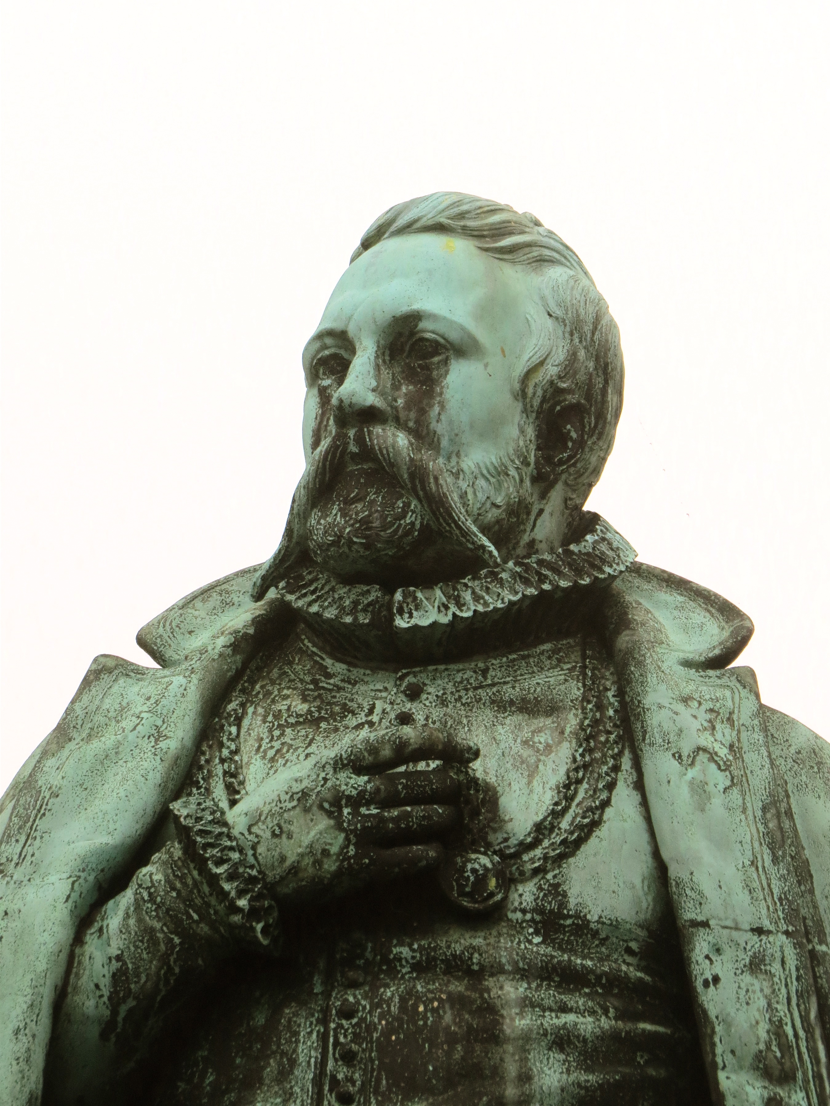 Detalje fra statue af Herman Wilhelm Bissen, København